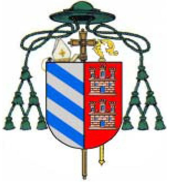 Escudo del obispo Francisco Delgado López.